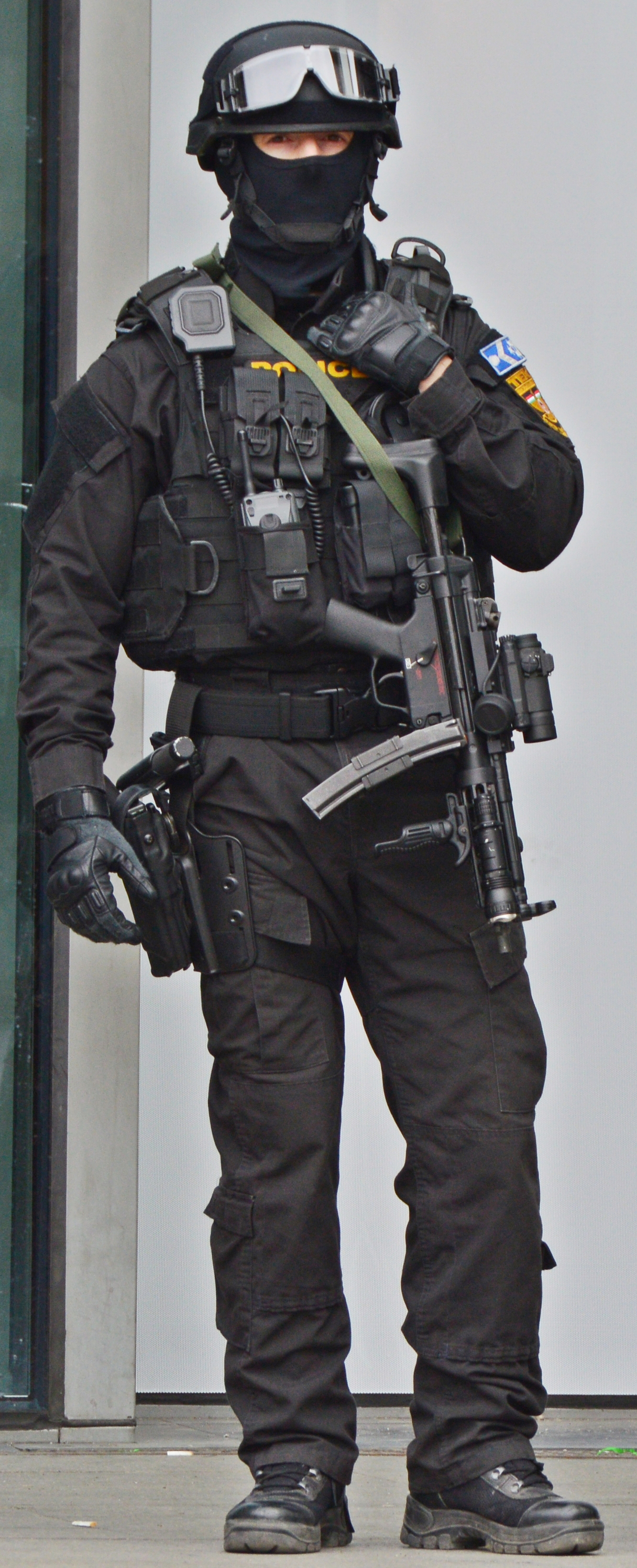 TEK járőre